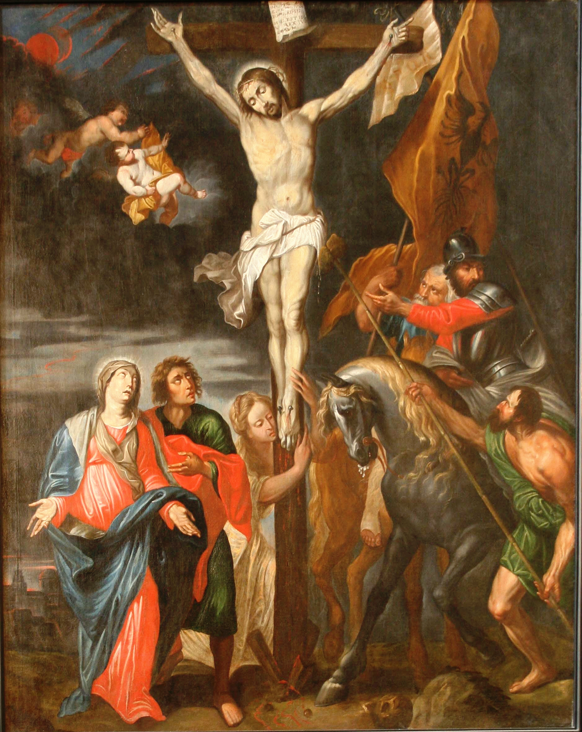 Tableau de la crucifixion, copie d'une oeuvre de Van Dyck, dans la basilique de Saint-Maximin dans le département du Var.